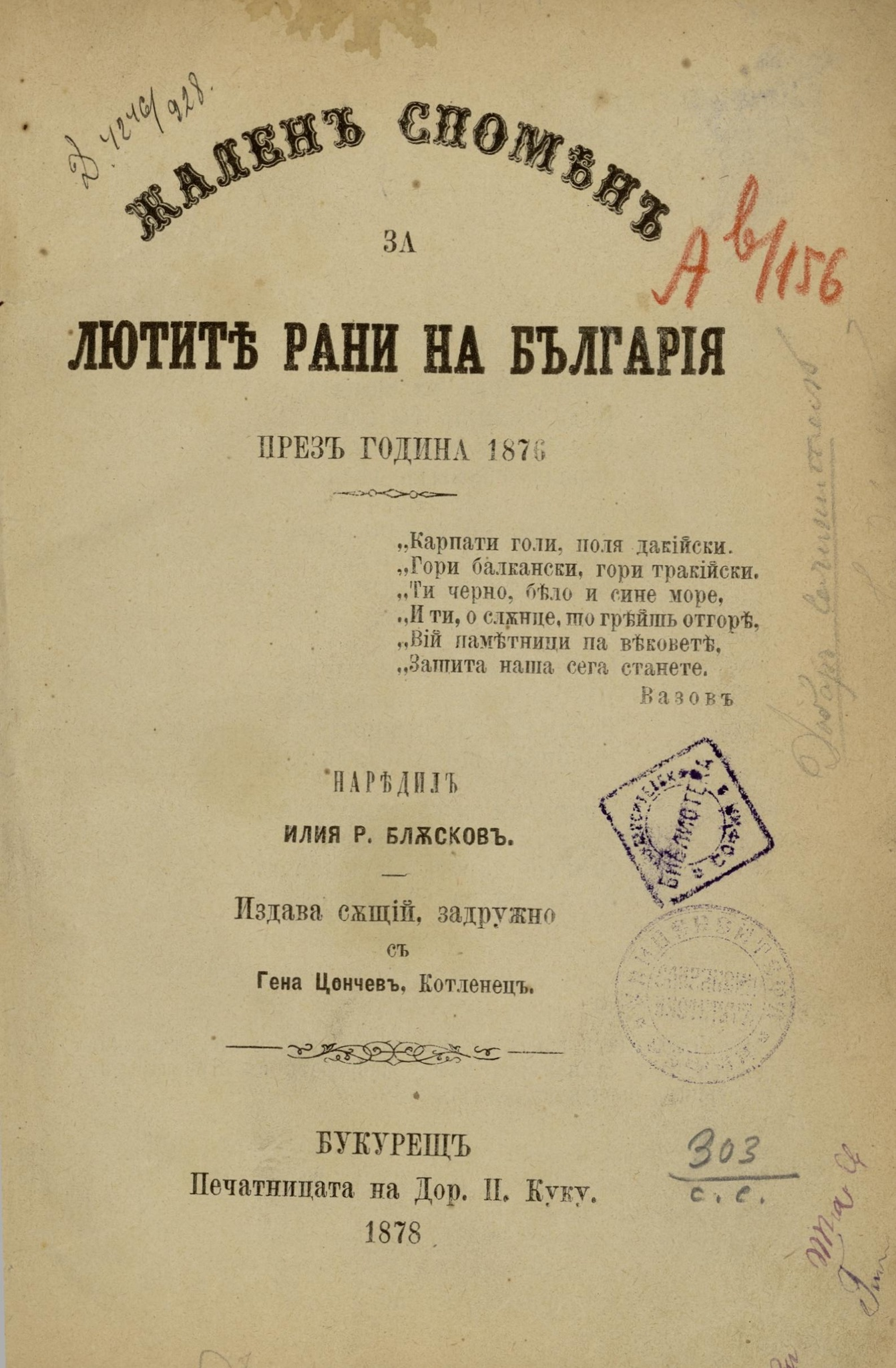 Факсимиле на заглавната страница на книгата „Жален спомен за лютите рани на България през година 1876“